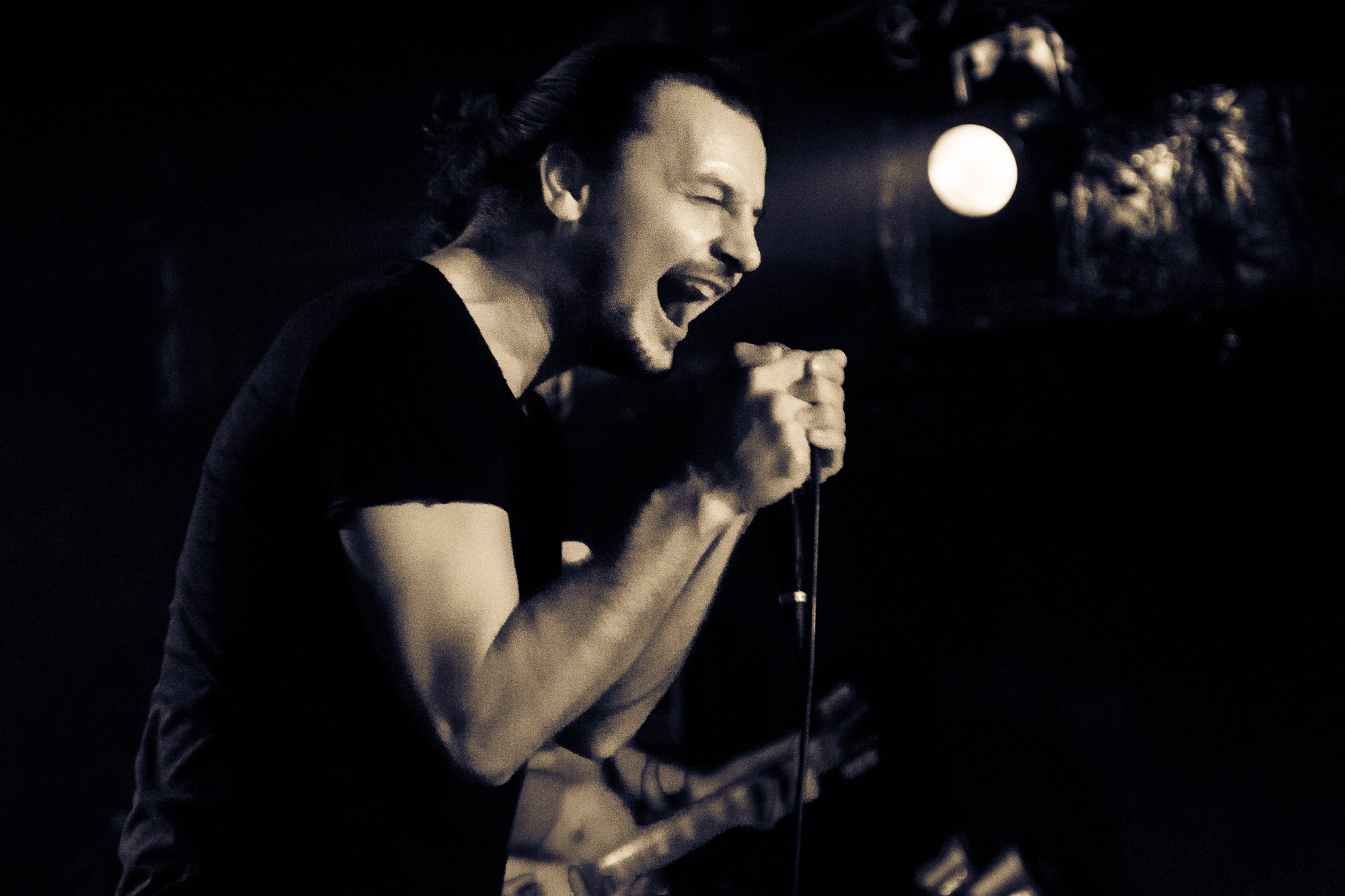 Robert Gajewski, wokalista zespołu Carnal podczas koncertu Rock Na Zielono w klubie Proxima, Warszawa.